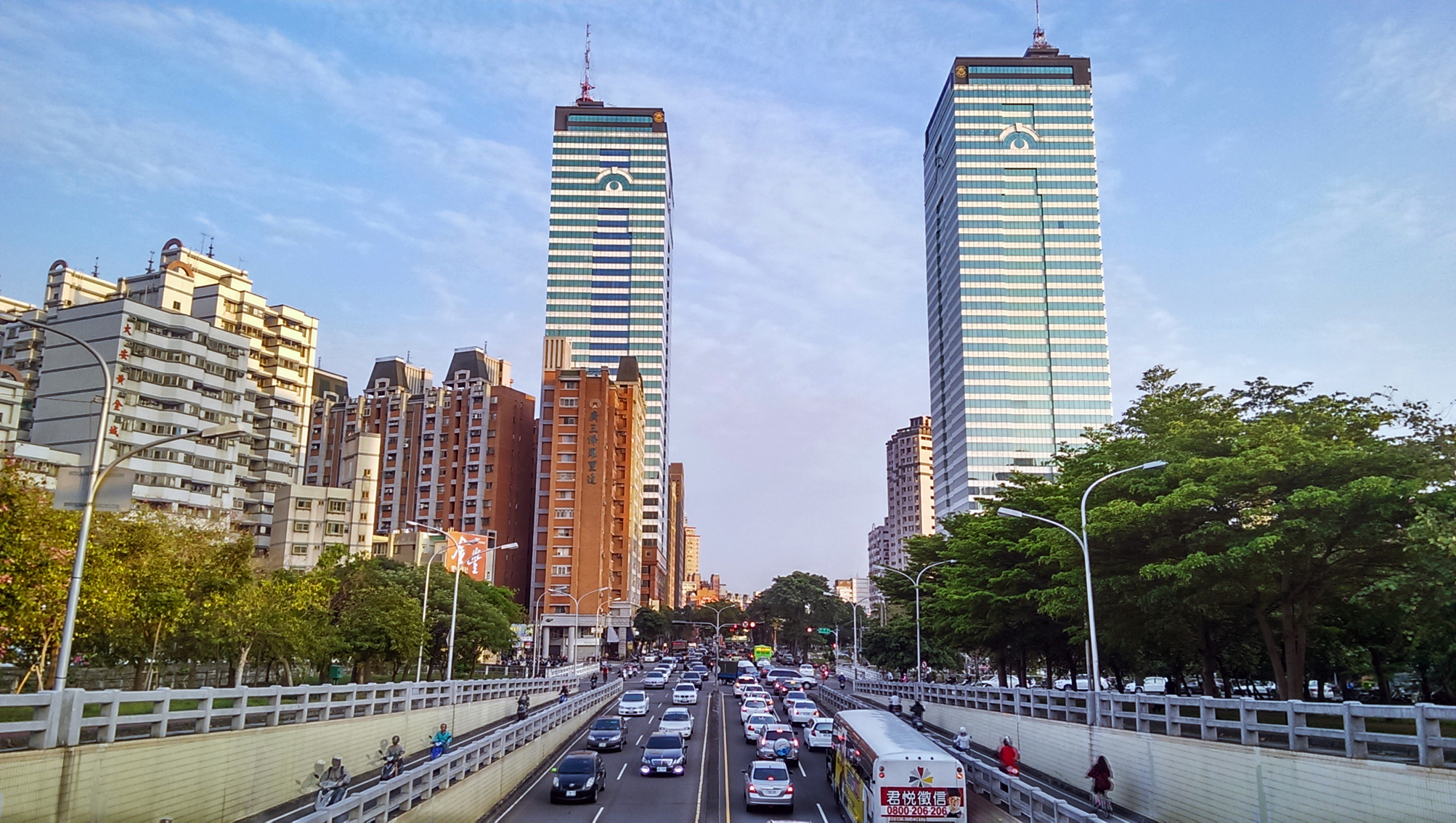 中文（台灣）: 忠明南路地下道前一景